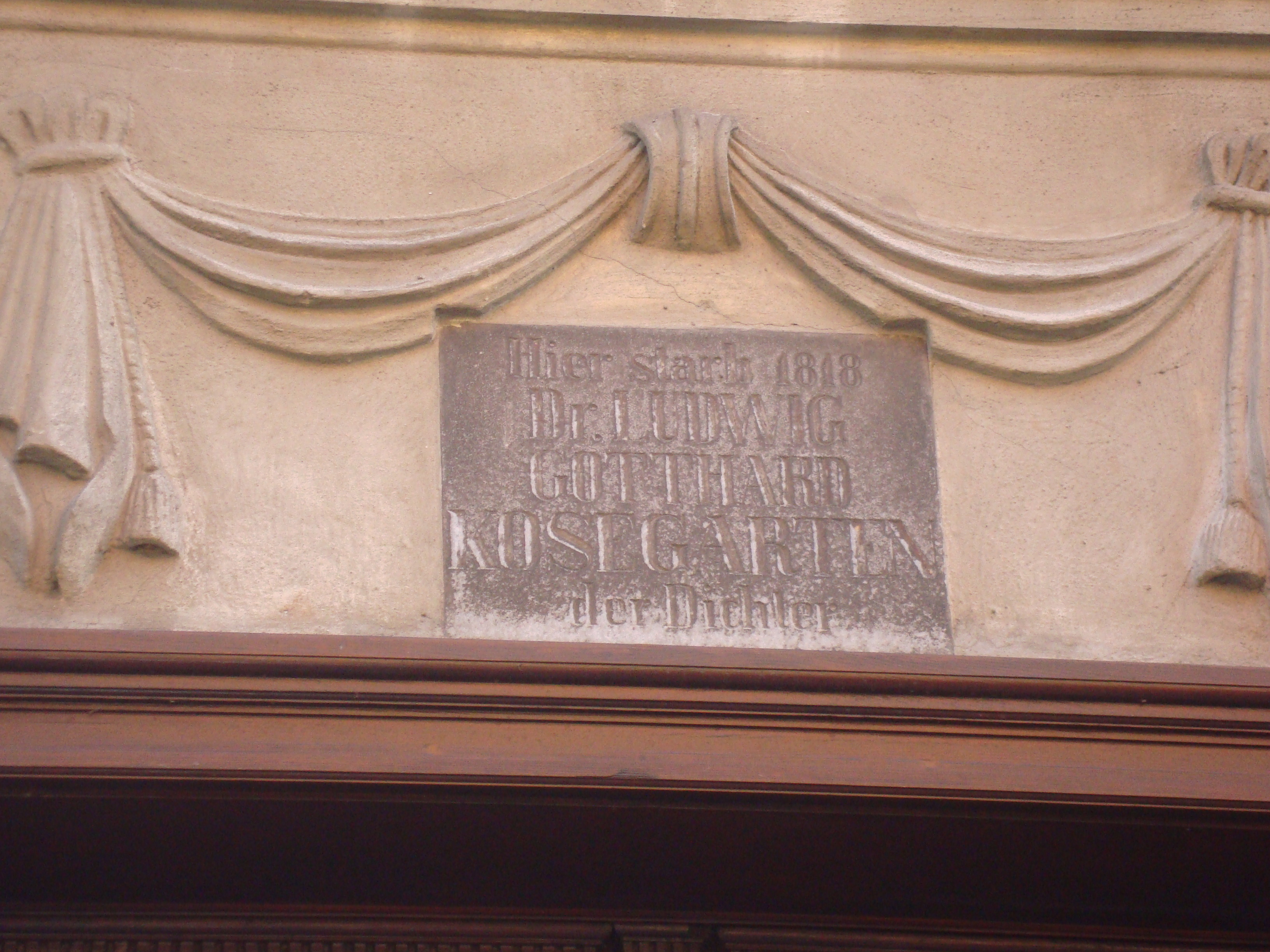 Gedenktafel für Ludwig Gotthard Kosegarten in der Domstraße 9 in Greifswald.